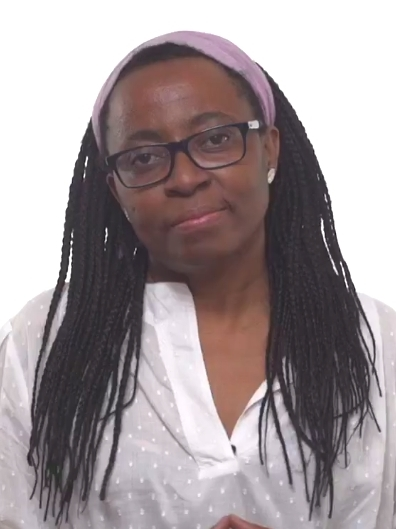 Rita Bosaho nos explica en que consiste la iniciativa presentada en el Congreso